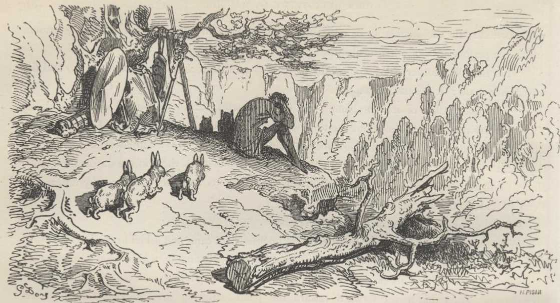 Ilustração de Gustave Doré para a edição de 1863 de "Dom Quixote" de Miguel de Cervantes